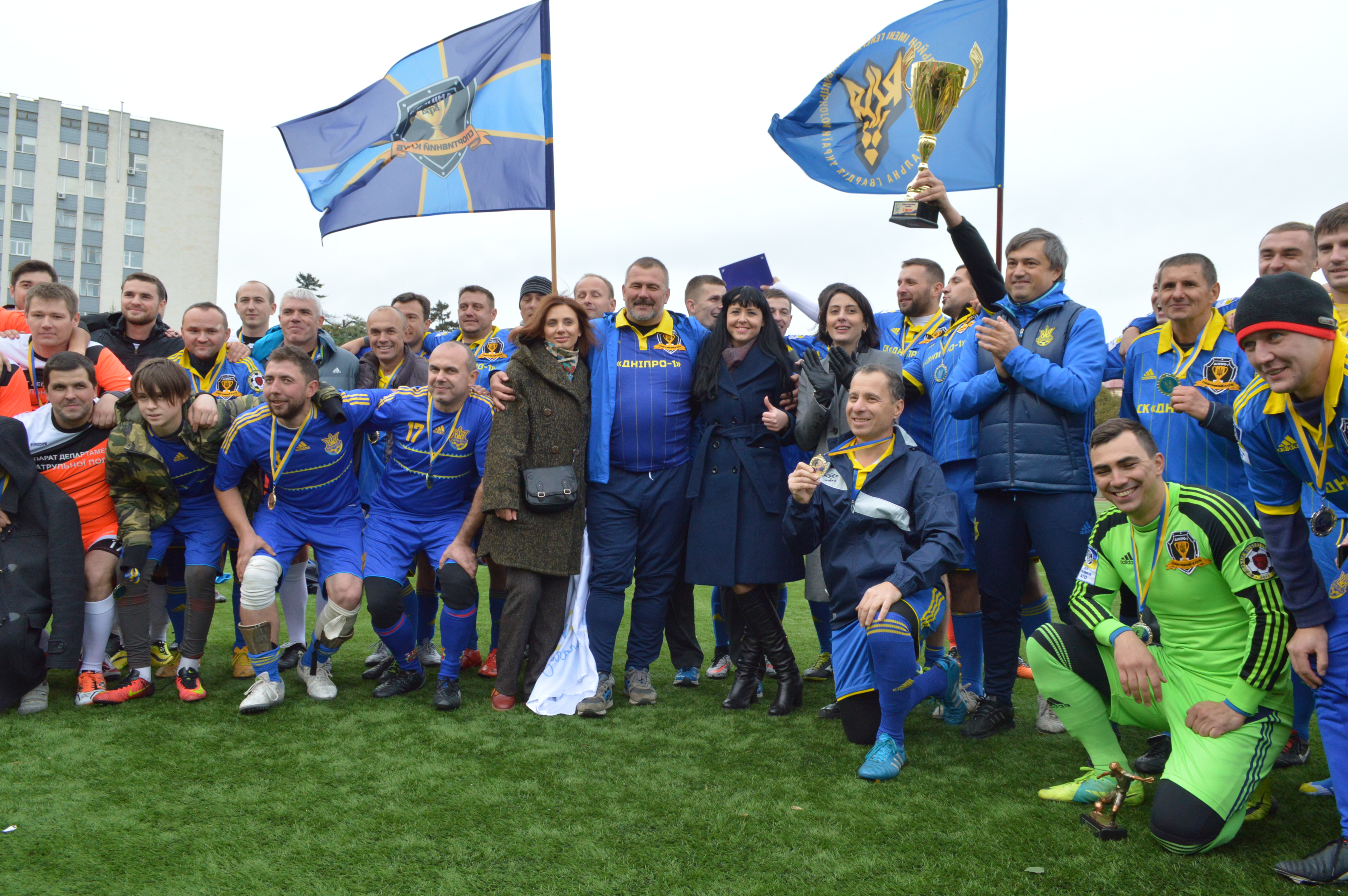 Кубок захисника